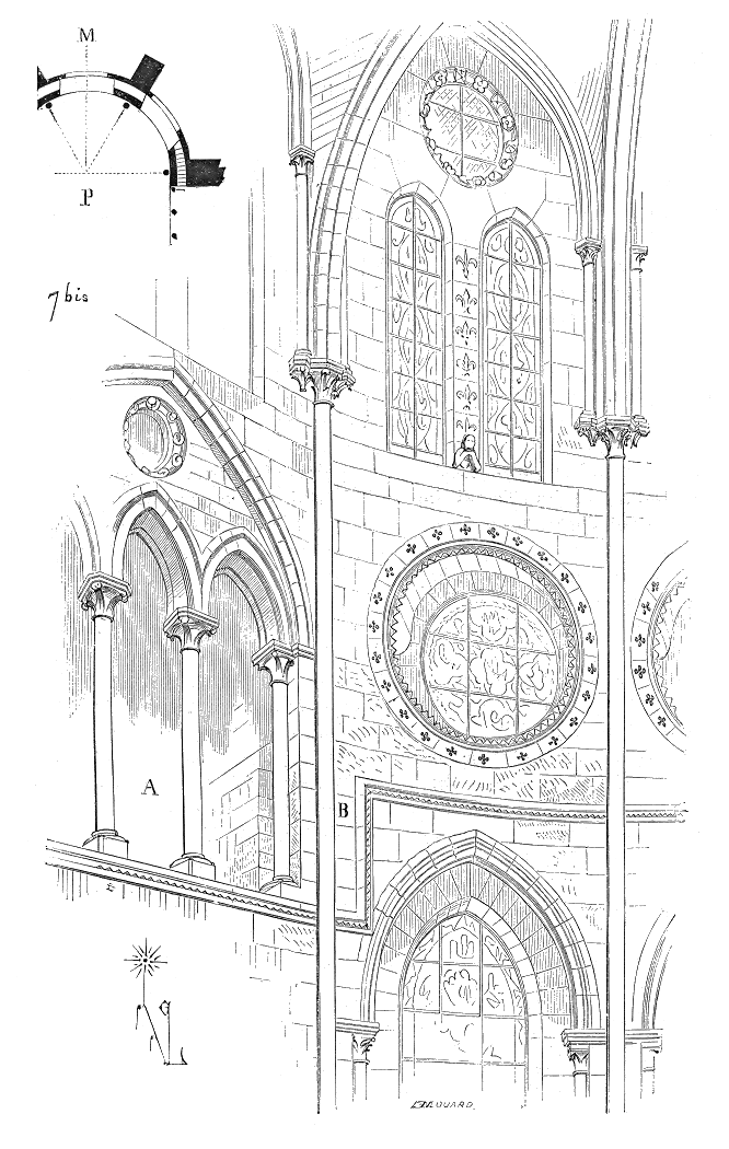 ... Un autre monument, contemporain de l'église de Saint-Leu d'Esserent, donne à la fois le triforium avec voûtes et le triforium étroit éclairé par des fenêtres: c'est la petite église de Moret (Seine-et-Marne). Les parties parallèles du chœur de cette église possédaient une galerie de premier étage ou triforium voûté au-dessus des ailes; mais l'abside, semi-circulaire, sans collatéraux, possède, au-dessus d'un rang de fenêtres basses, un triforium dont la composition originale nous montre une suite de lunettes ou roses sans meneaux, entre lesquelles est ménagé un passage. La vue perspective (fig. 7 bis) explique cette singulière structure. En A, est le triforium projeté conformément à la méthode de l'Île-de-France, c'est-à-dire voûté ...